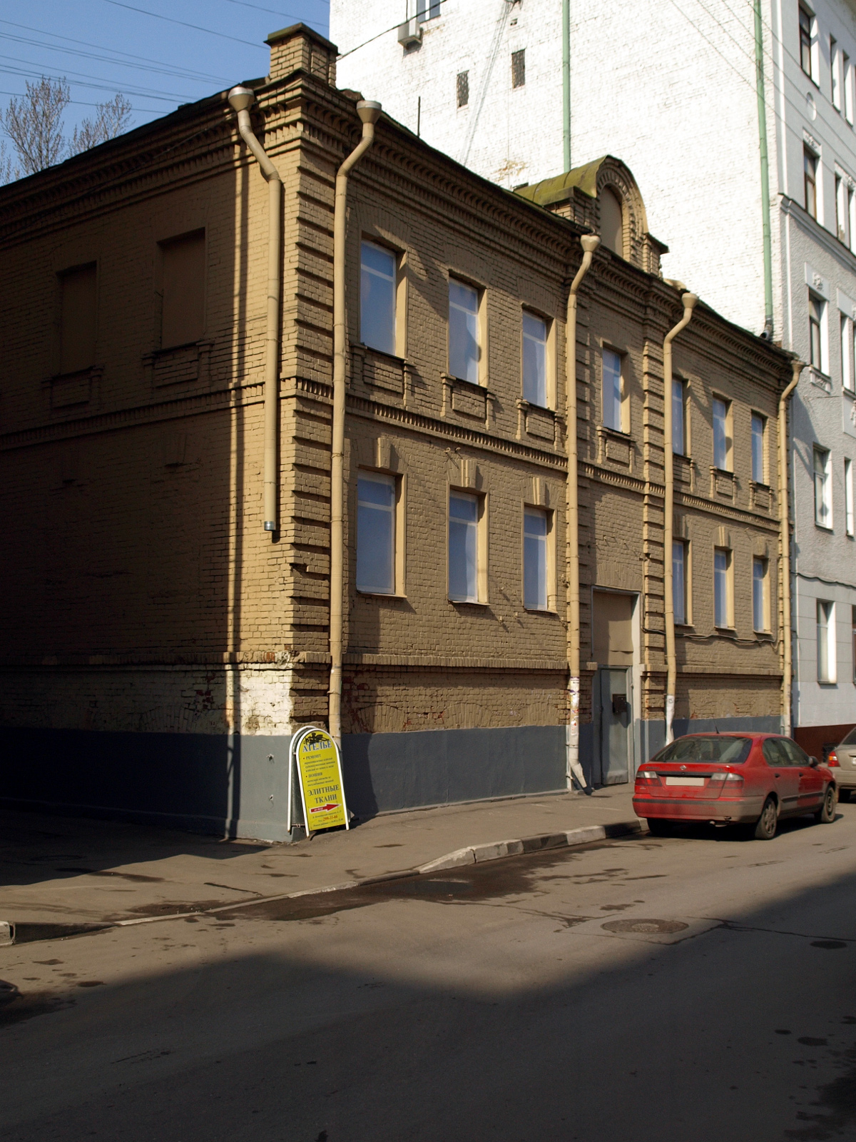 Москва, Большой Козихинский переулок.